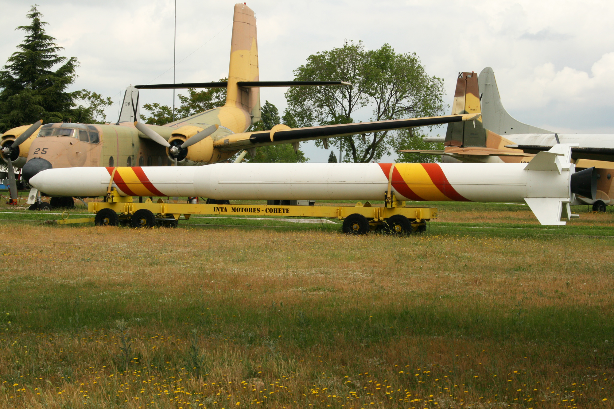 Maqueta a escala real del Cohete Capricornio, proyecto de lanzador de satélites artificiales desarrollado por INTA en España desde 1992 y cancelado en 2000. Museo del Aire de Cuatro Vientos (Madrid, España). Rocket Capricornio Real scale model of the Rocket Capricornio, project of artificial satellite launcher developed by INTA in Spain since 1992 and canceled in 2000. Museum of the Air of Cuatro Vientos (Madrid, Spain).